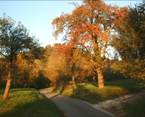 Floriansberg und Obstbäume im Herbst